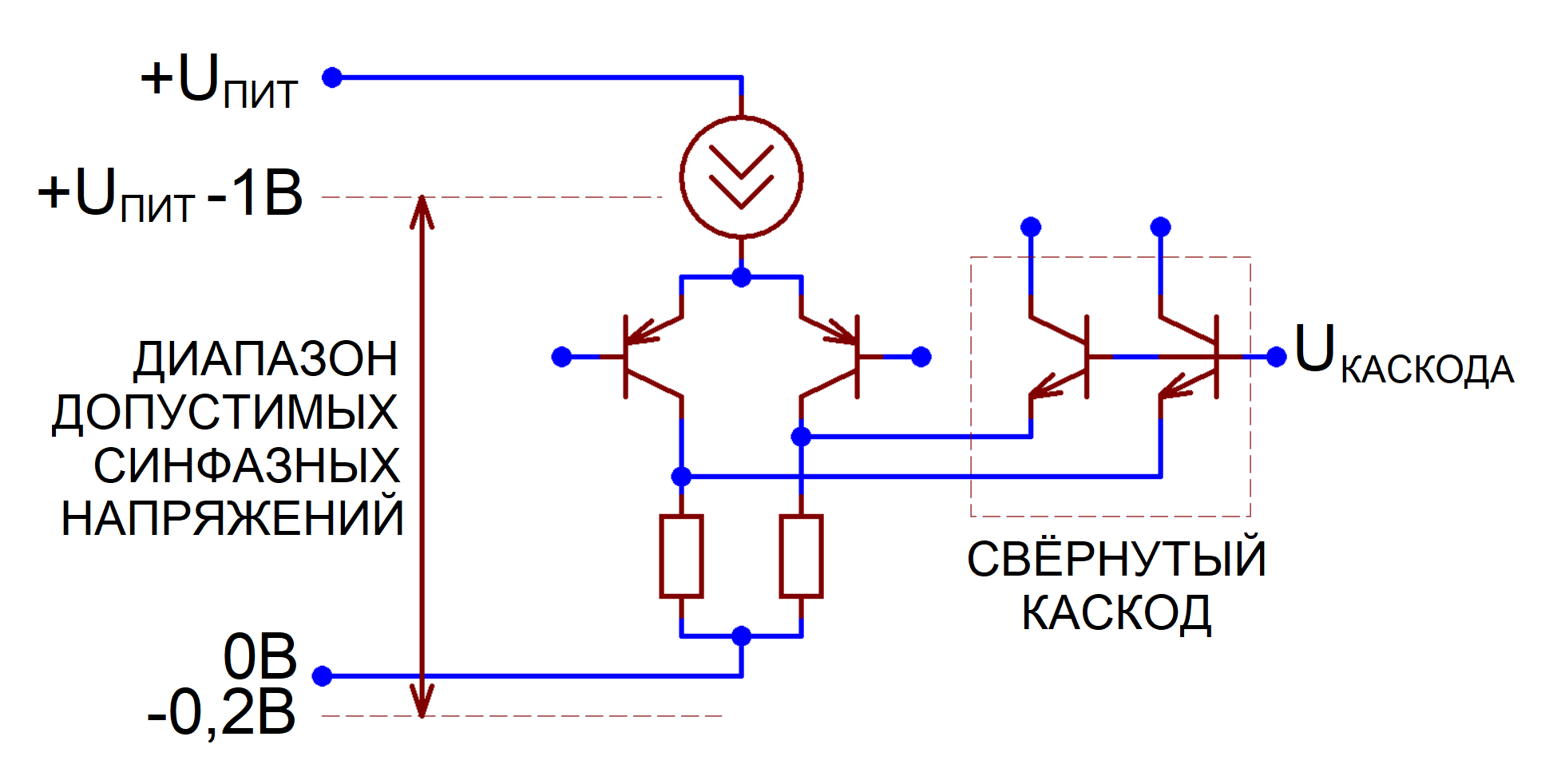 Устройство простейшего входного каскада ОУ с однополярным питанием. Допустимый диапазон входных напряжений охватывает нулевую (нижнюю) шину. Описание см. например в первой главе Jung W.[en]. Op Amp Applications Handbook. — Analog Devices / Elsevier, 2005. — ISBN 0916550265. — ISBN 0750678445.